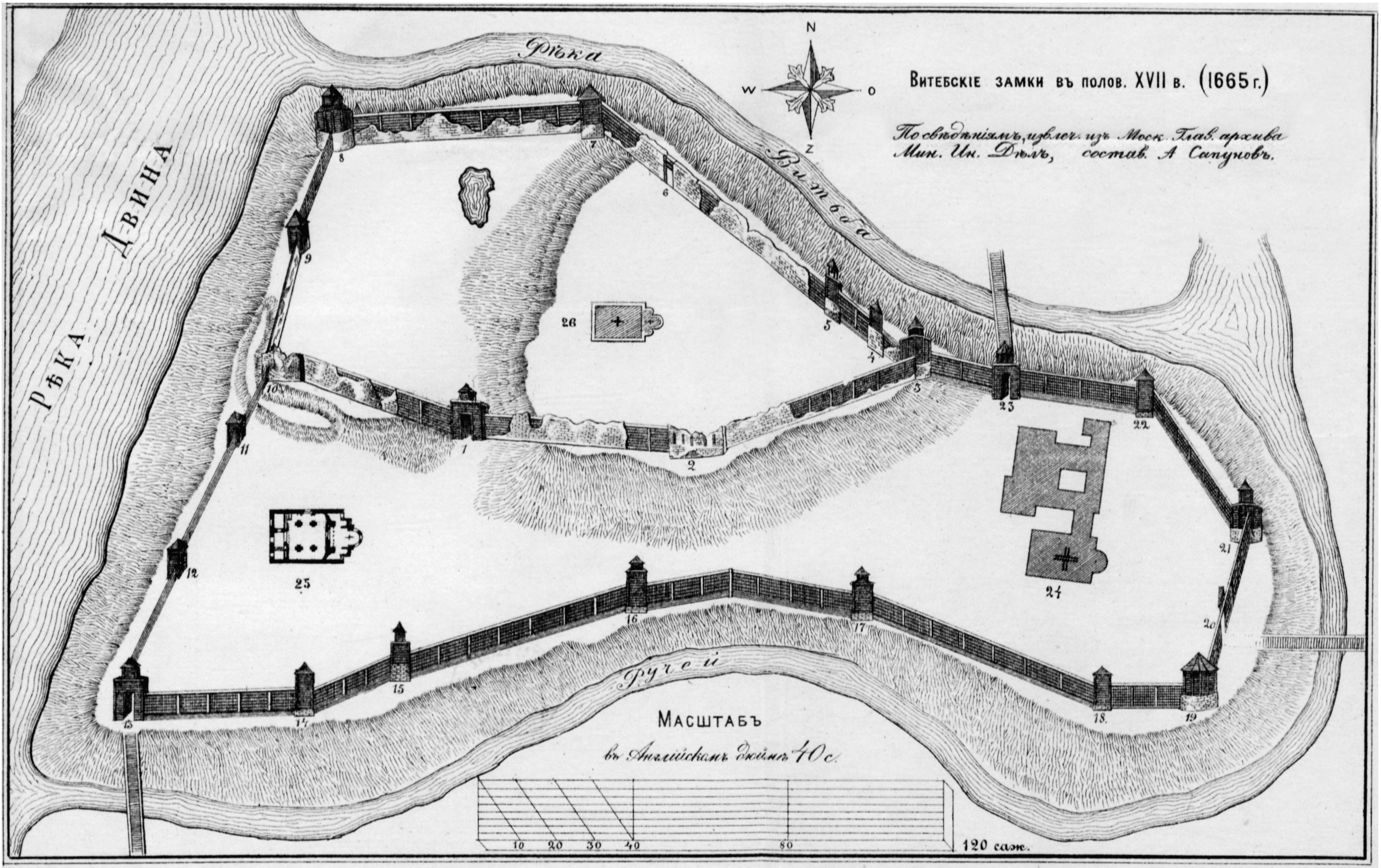 Витебские замки в полов. XVII в. (1665 г.) По сведениям извлеч. из Моск. Глав. архива Мин. Ин. Дел, состав. А. Сапунов.